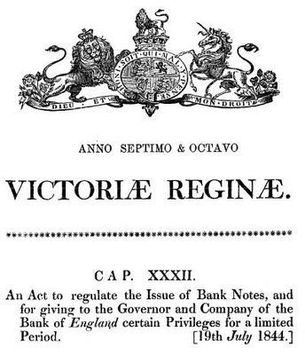 1844 թվականի Բանկային ակտի տպագրված օրինակի առաջին էջը